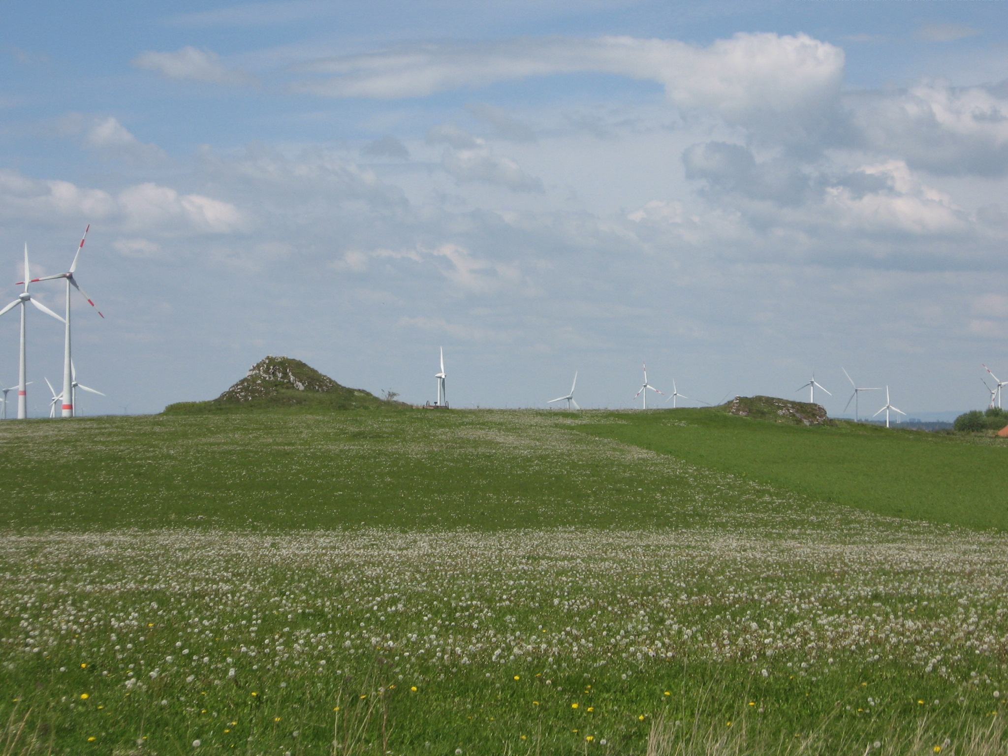 Das Naturschutzgebiet Battenberg nördlich von Brilon-Rösenbeck im Hochsauerlandkreis (NRW, D) aus Richtung Süden.